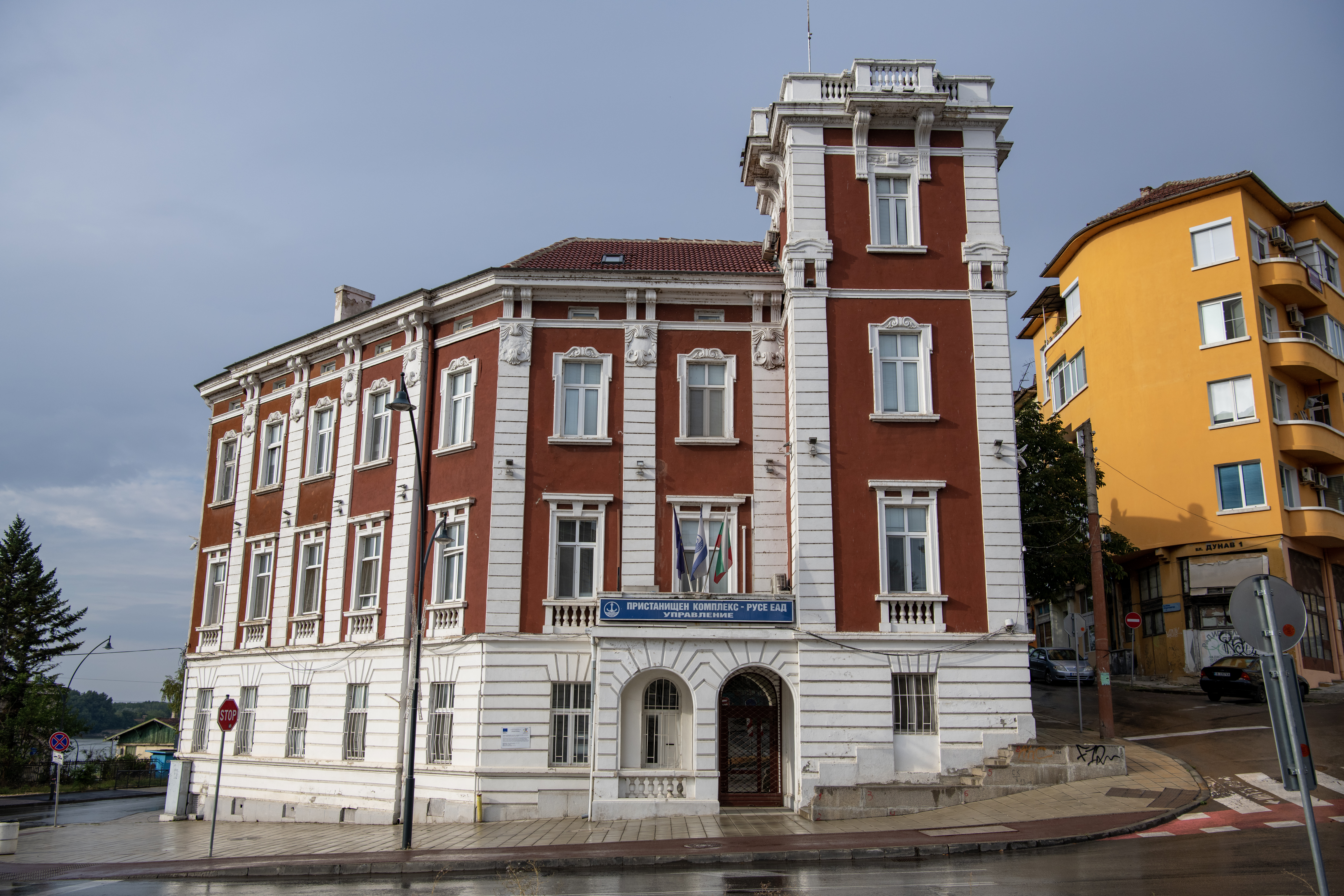 Снимката документира управлението на Пристанищен комплекс - Русе.